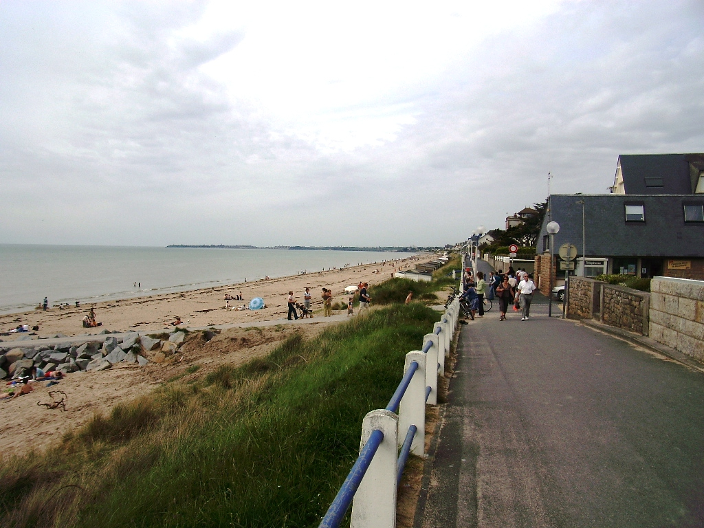 La plage de Jullouville (50) en avril à marée haute.